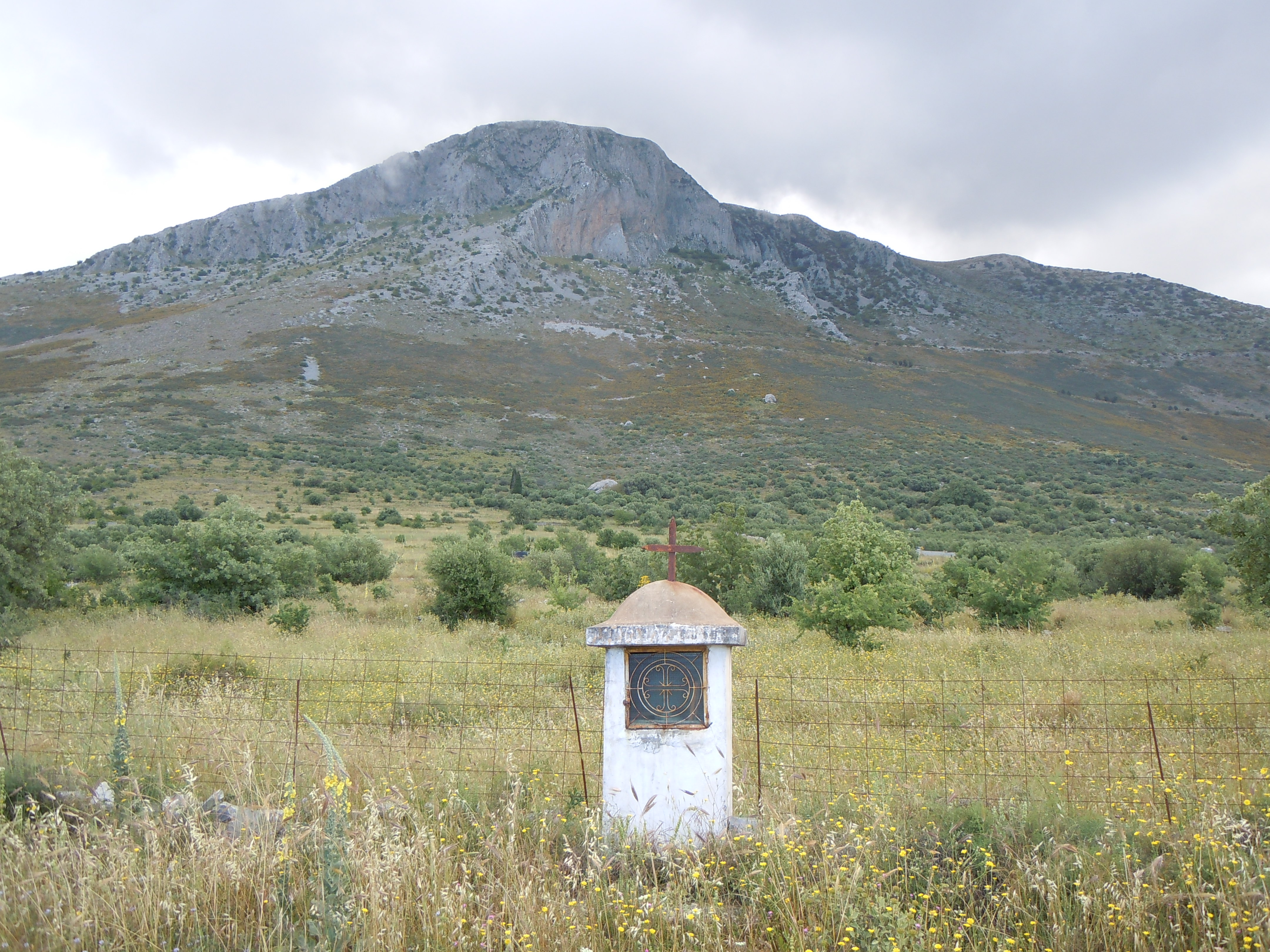 Paysage au sud d'Agios Nikon, Magne-occidental, Messénie